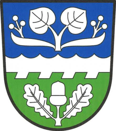 Mokrosuky znak